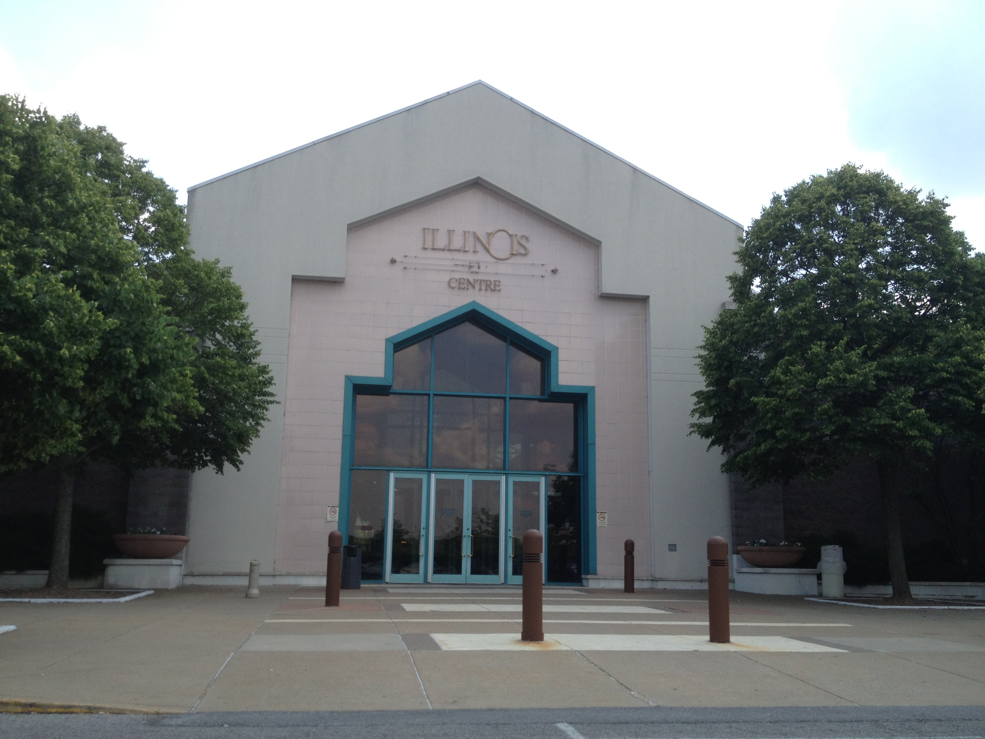 Illinois Centre Mall